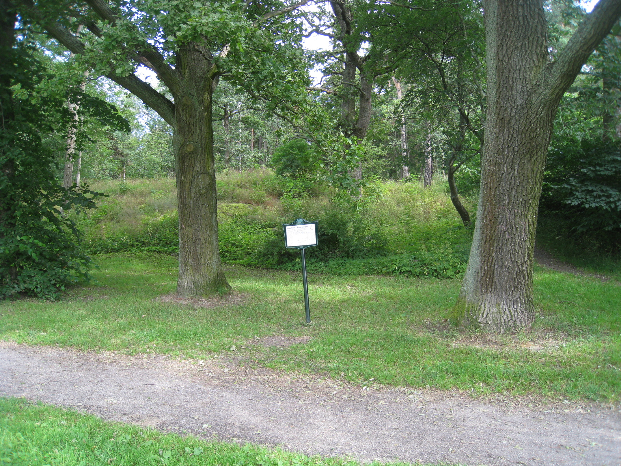 Vikingatida gravfält beläget vid östra sidan av Ålstensängen i Ålsten i södra Bromma väster om Stockholm. Gravfältet är från yngre järnålder (550-1050 e.Kr.). Gravfältet består av 4 runda och 3 rektangulära stensättningar.